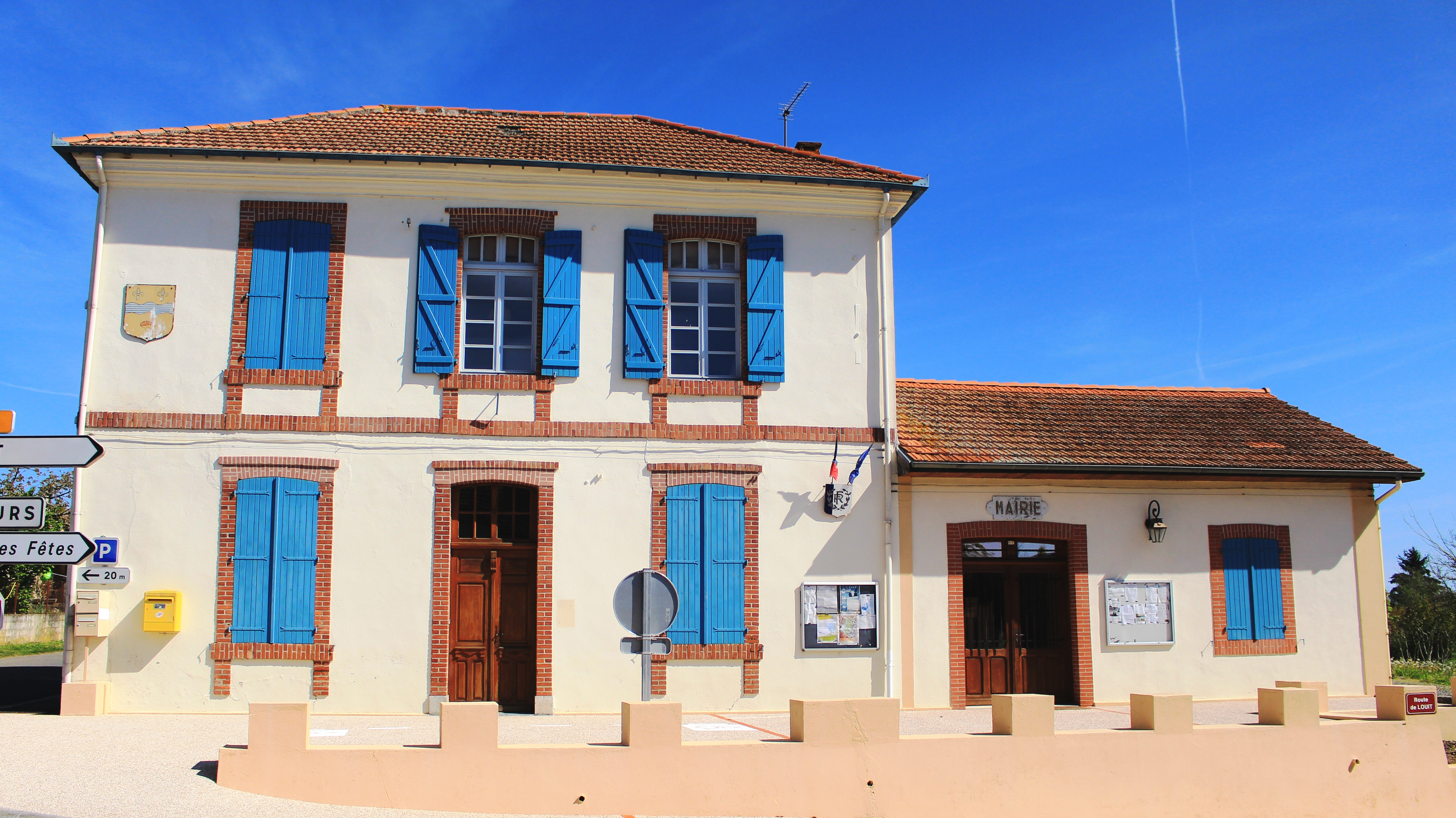 Mairie de Sabalos (Hautes-Pyrénées)